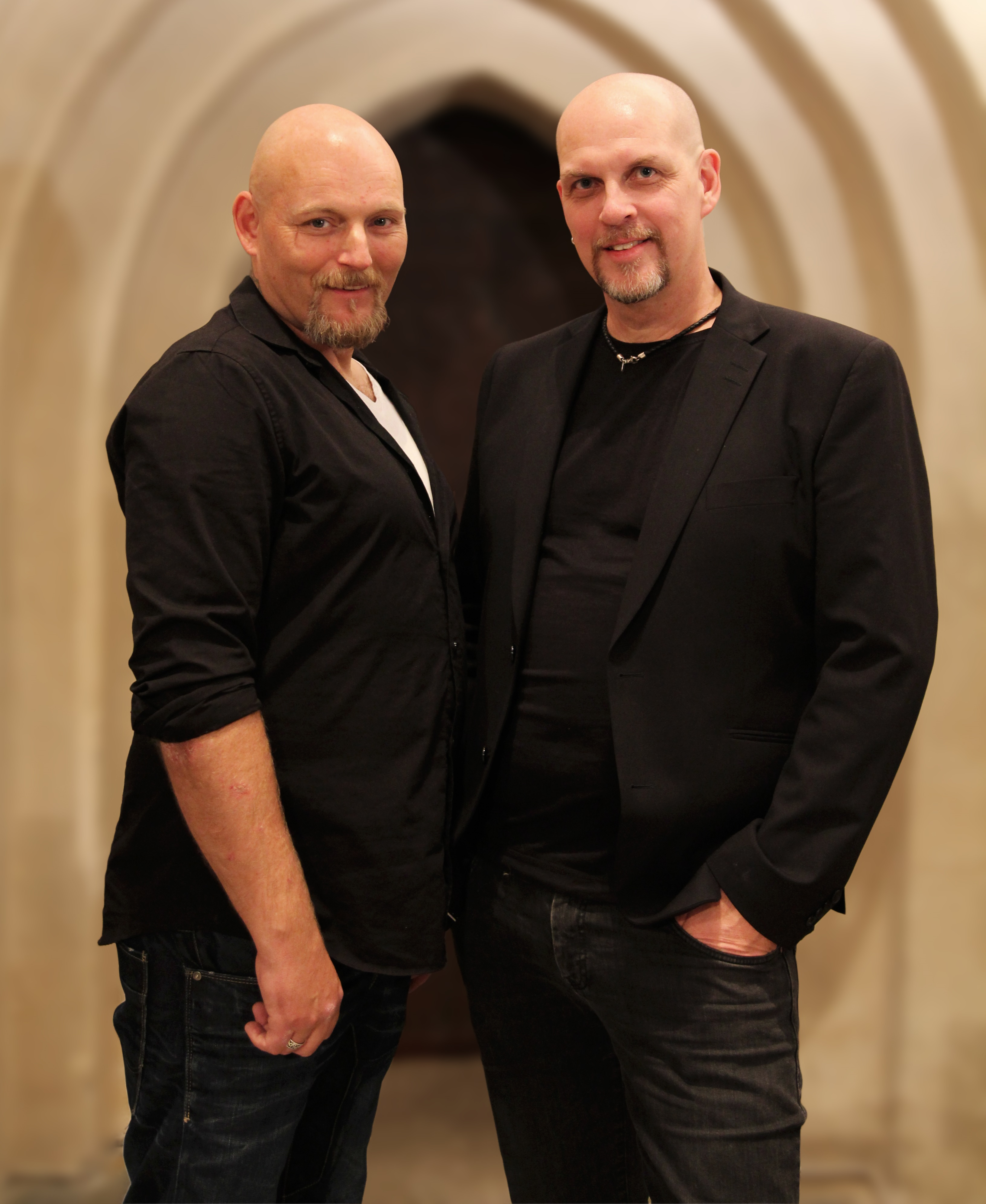 Gruppen Nordman: Håkan Hemlin (till vänster) och Mats Wester.